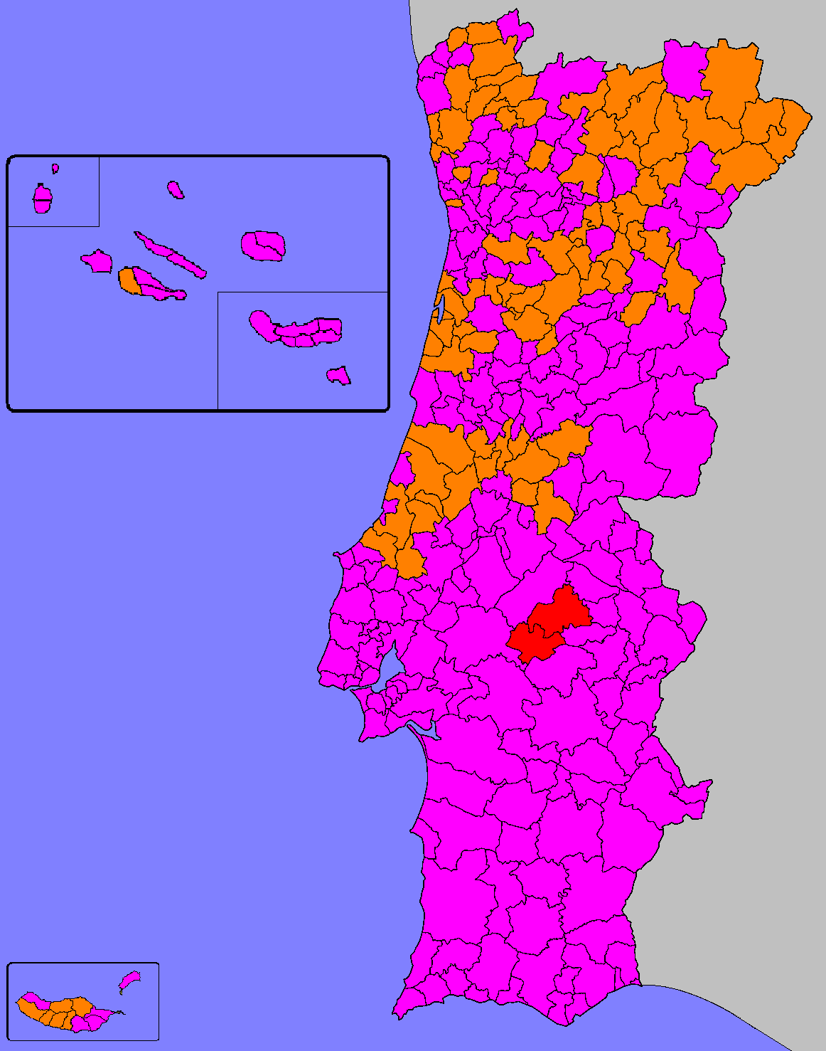 Mapa ilustrativo do partido mais votado por concelho nas eleições de 2019